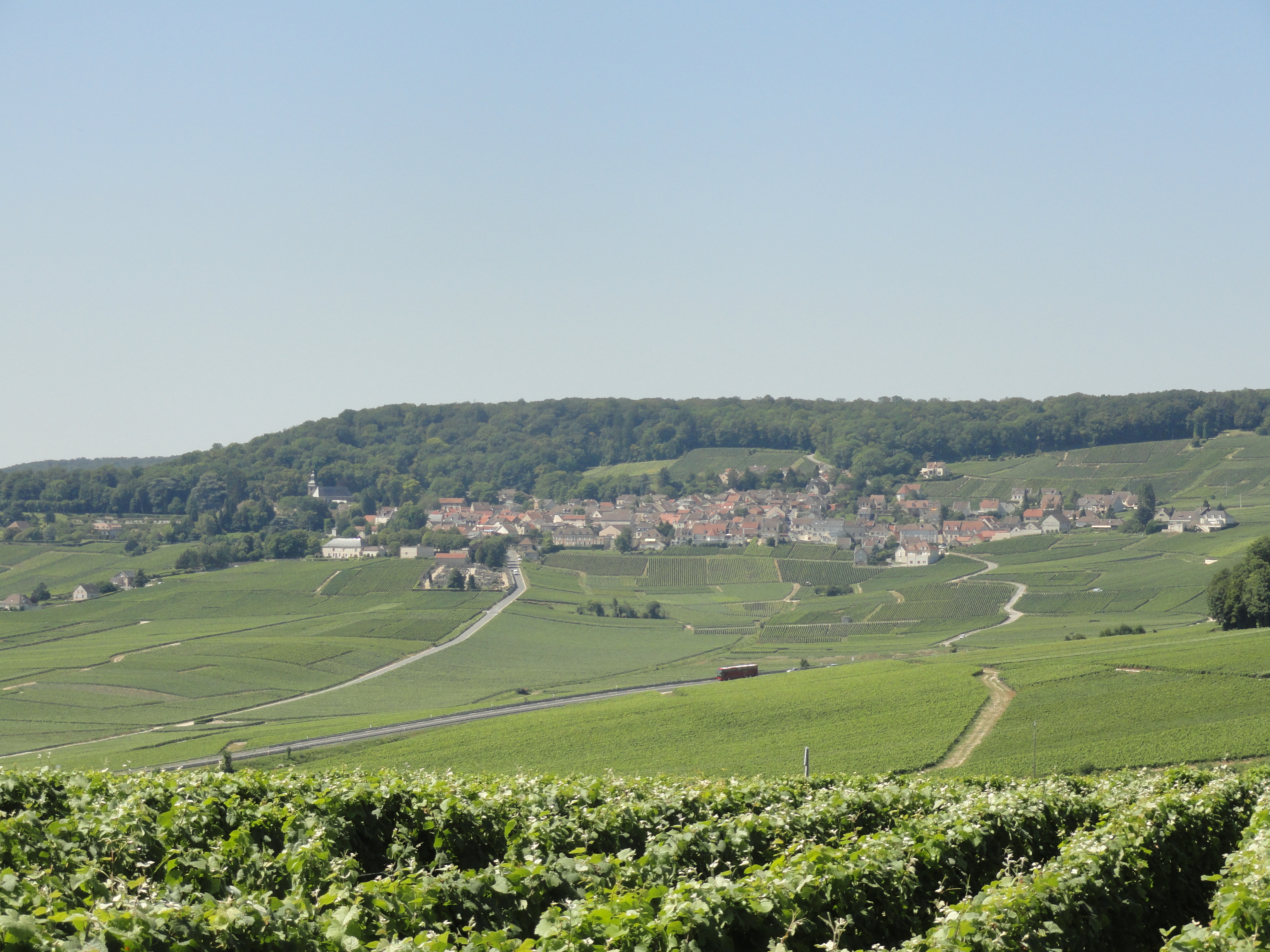 Vue d'ensemble du village d'Hautvillers, sur la Montagne de Reims, depuis le point de vue aménagé entre Champillon et Dizy (Marne).